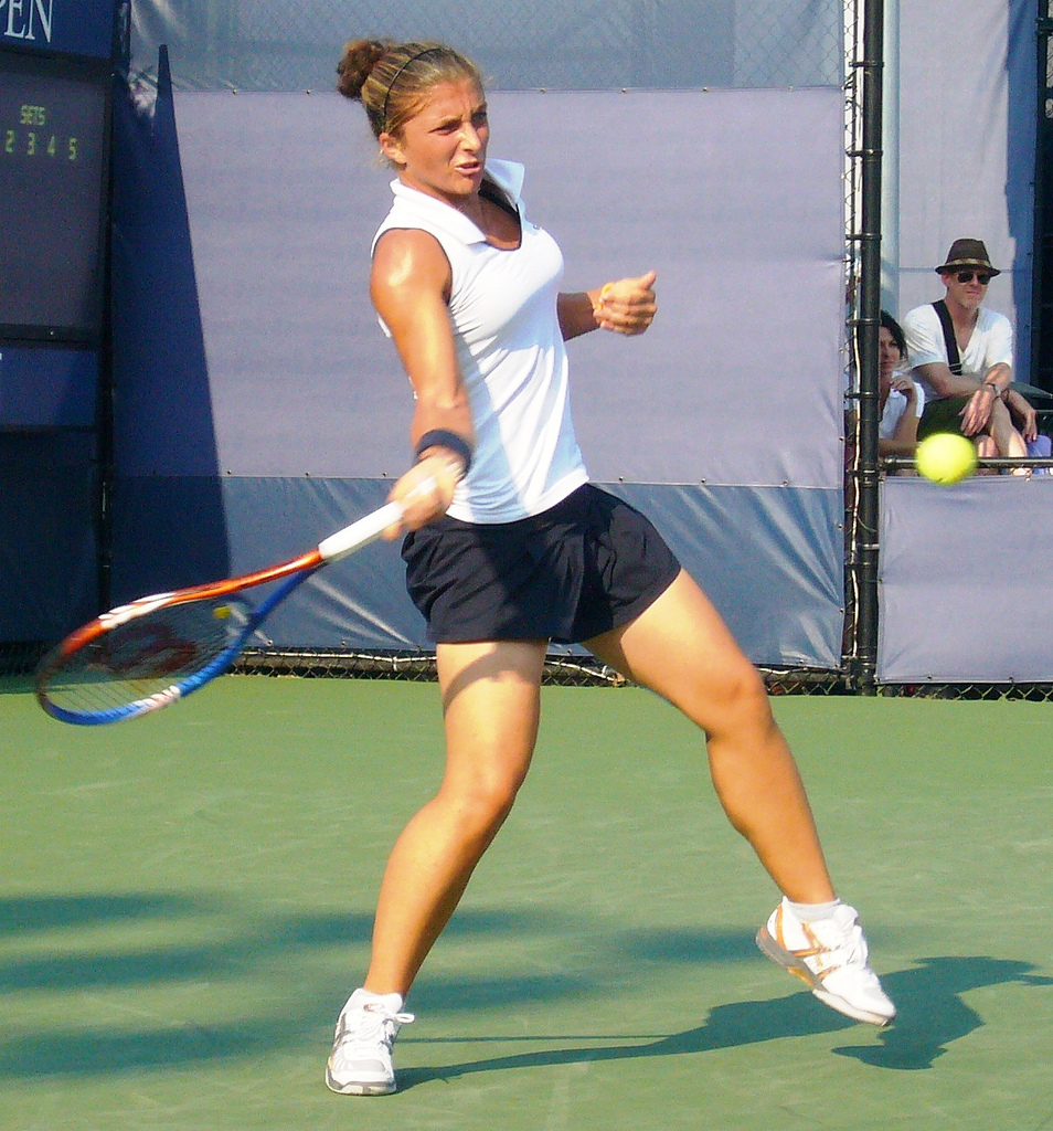 Sorana Cîrstea